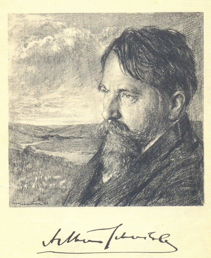 Emma Löwenstramm (1879-1941). Porträt von Arthur Schnitzler nach einer Originalzeichnung von Emma Löwenstamm Aus: Gesammelte Werke von Arthur Schnitzler : Erzählende Schriften. - Bd 1., 1912 ÖNB 486964-B.1.Neu